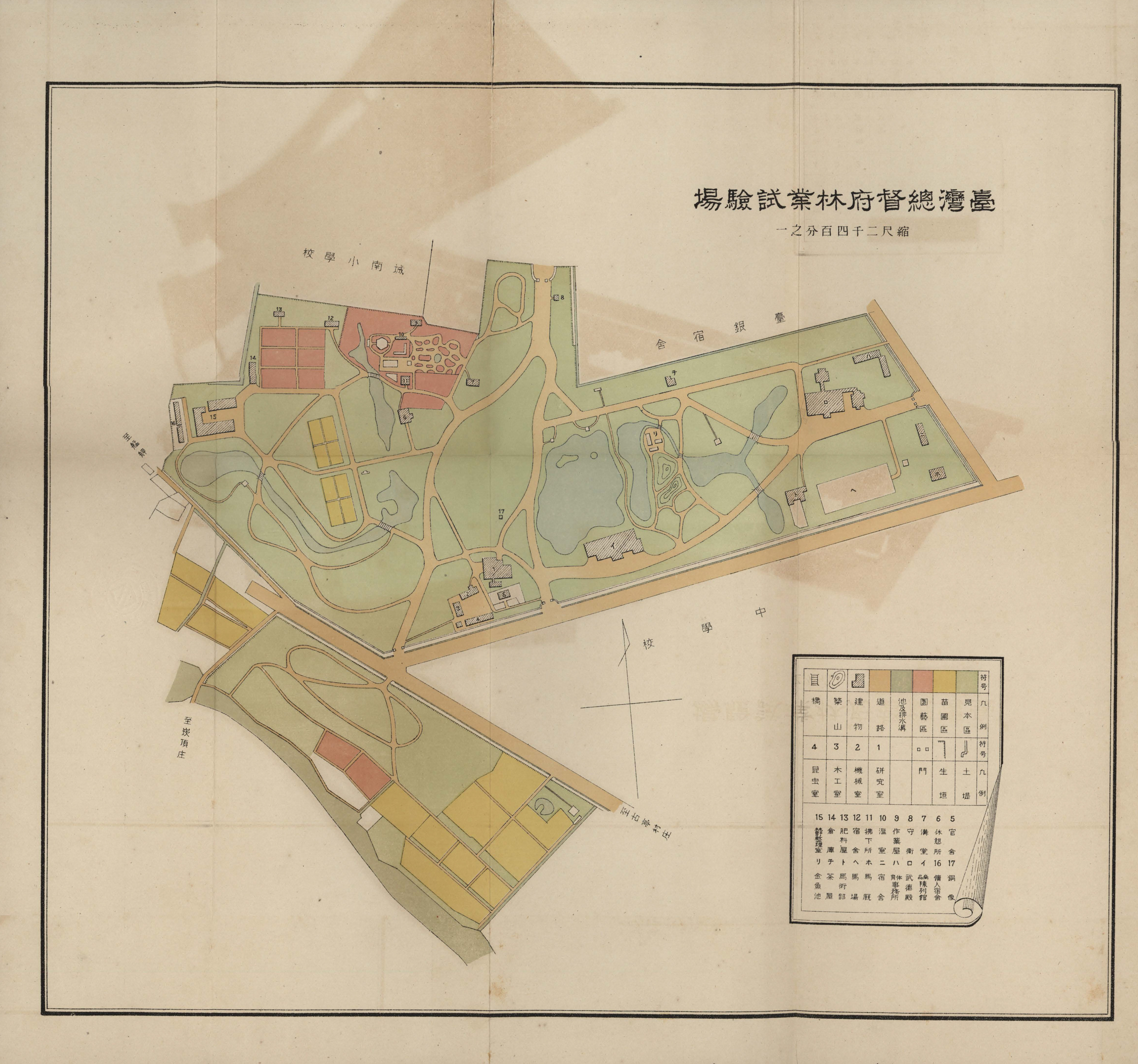 臺灣總督府林業試驗場平面圖，現為台北植物園